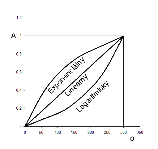 zavislost deliaceho pomeru A od otocenia hriadela potenciometra